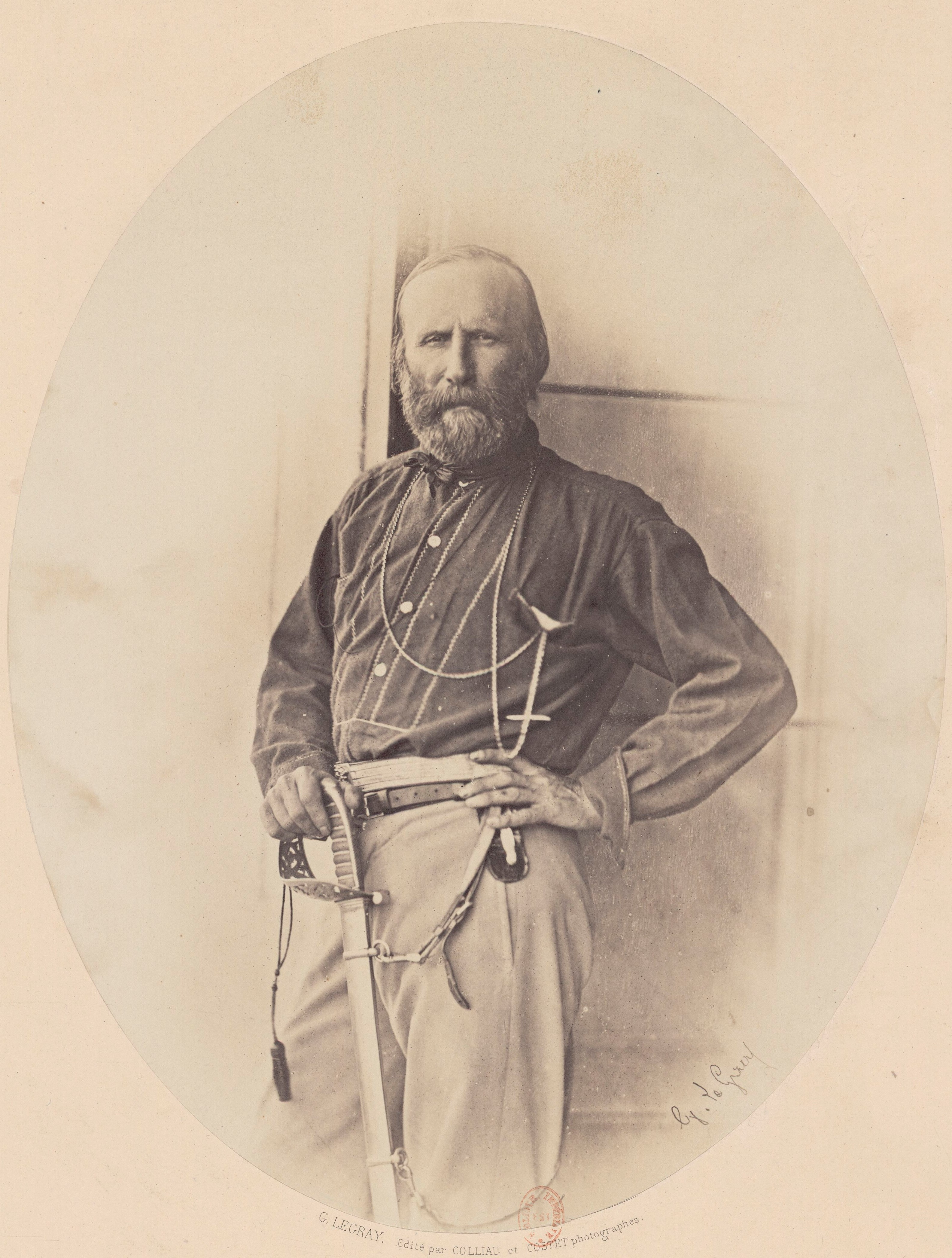 Gustave Le Gray (1820-1884), Portrait de Giuseppe Garibaldi (1808-1882) à Palermo en 1860.